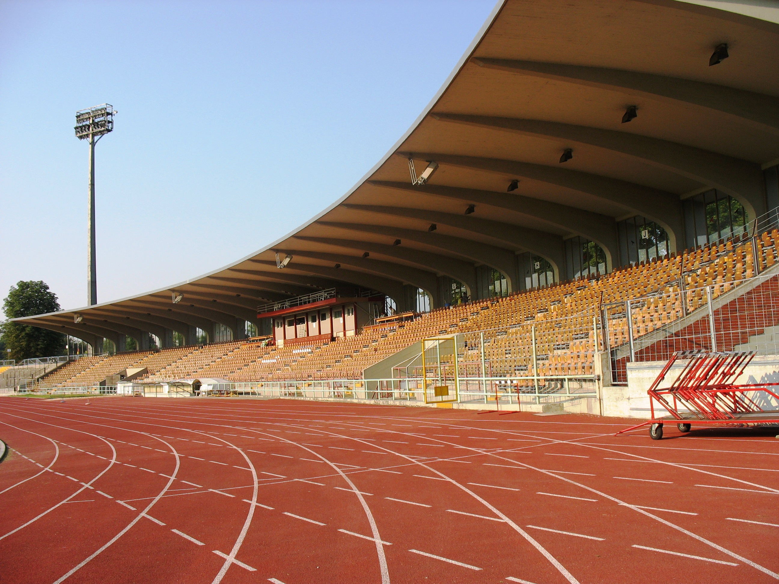 Rosenaustadion Augsburg